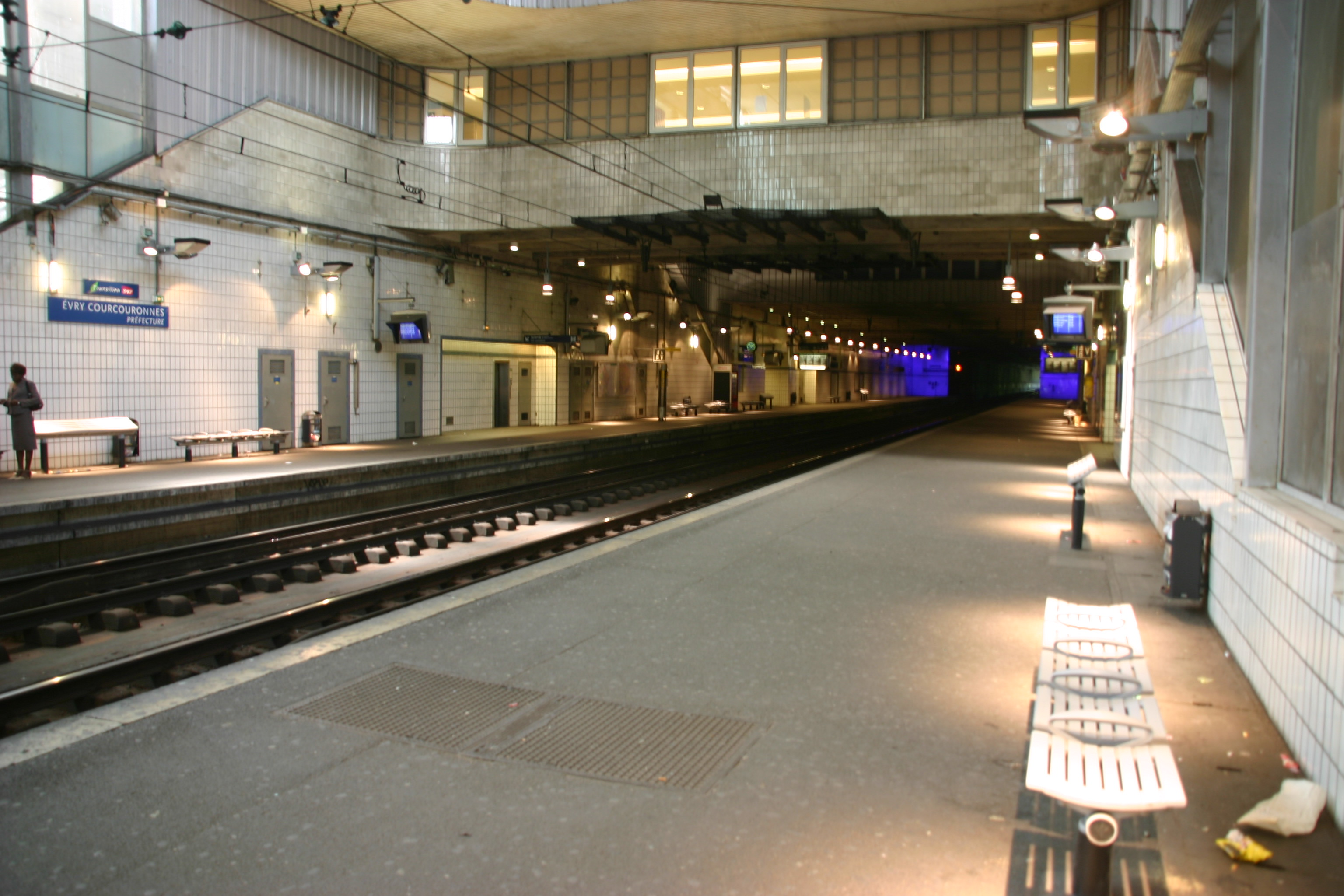 Gare d'Evry-Courcouronnes , Evry, département de l'Essonne, France